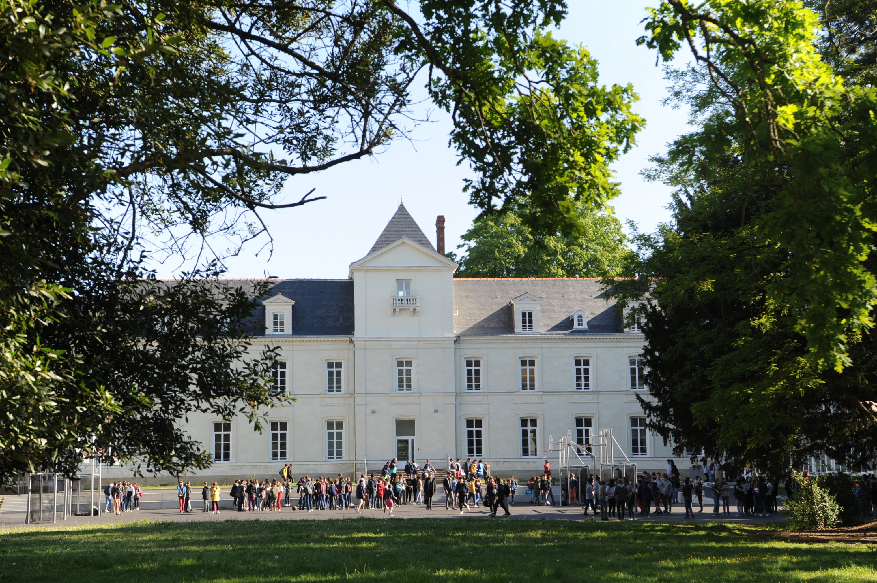 Le château du Plessis Tison, lycée Blanche de Castille Nantes. Restauré en 2017-2019.